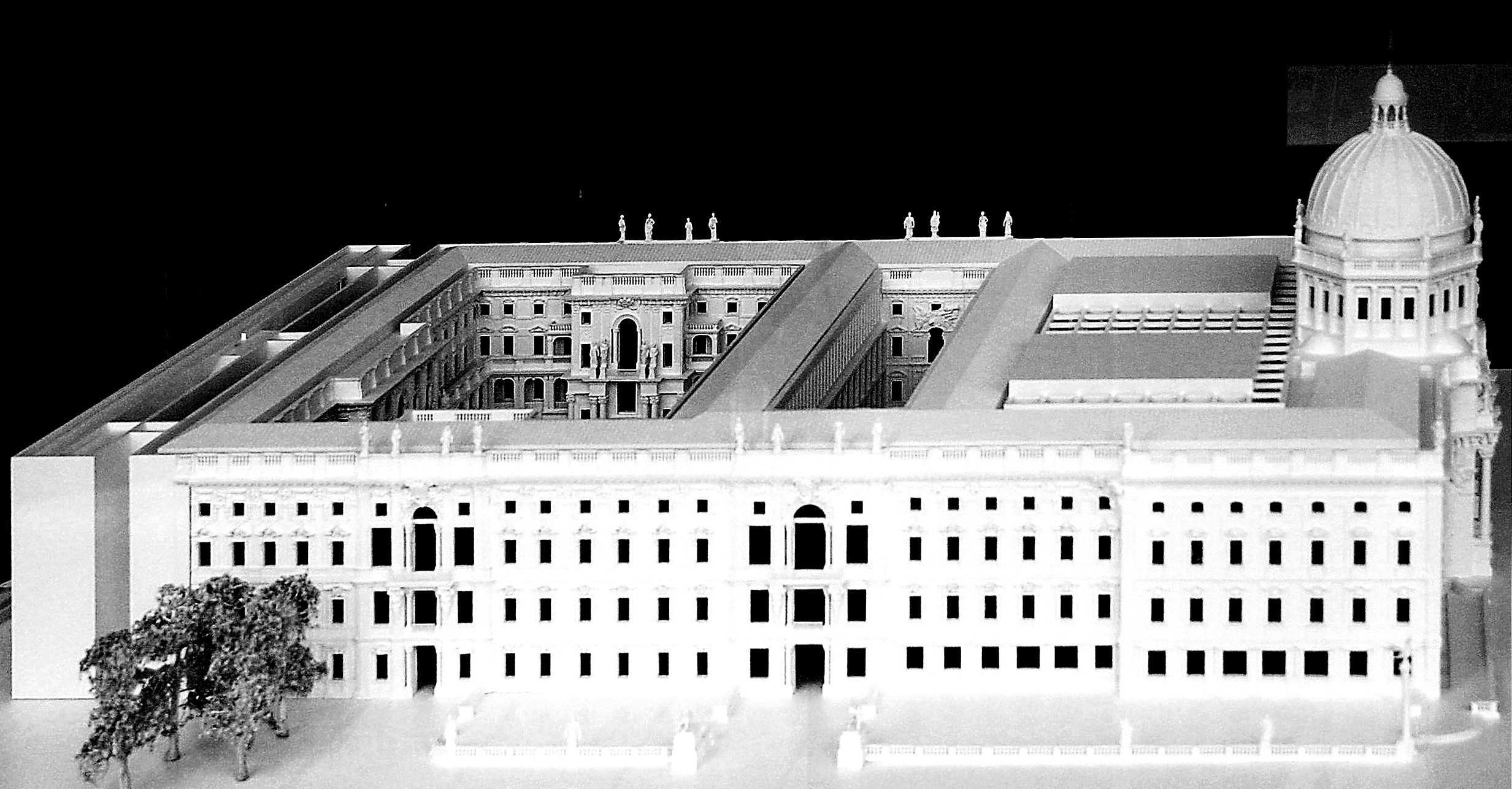 Modell Berliner Stadtschloss - Nordseite